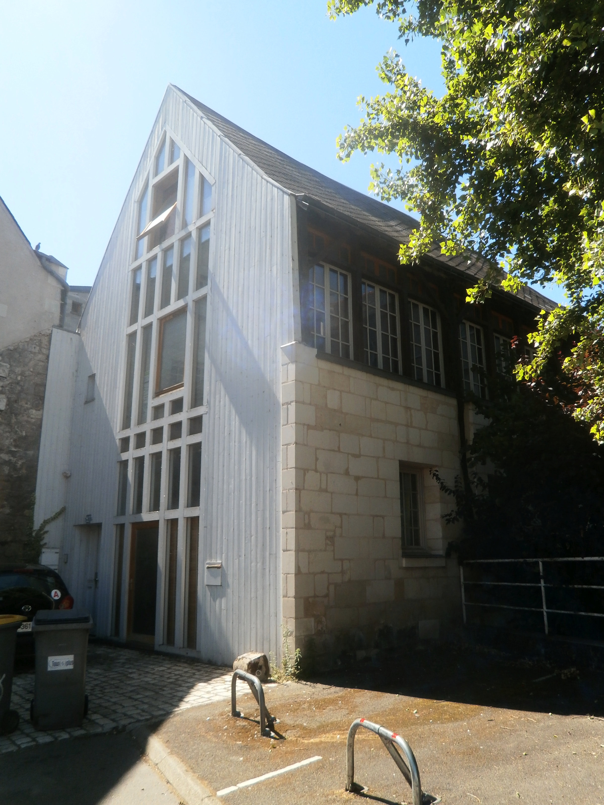 Ancienne salle du jeu de Paume